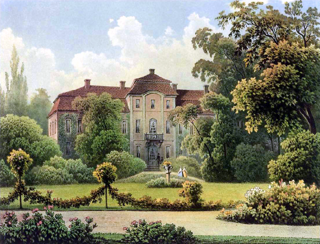 Schloss Goltzow, Kreis Zauche-Belzig, Provinz Brandenburg